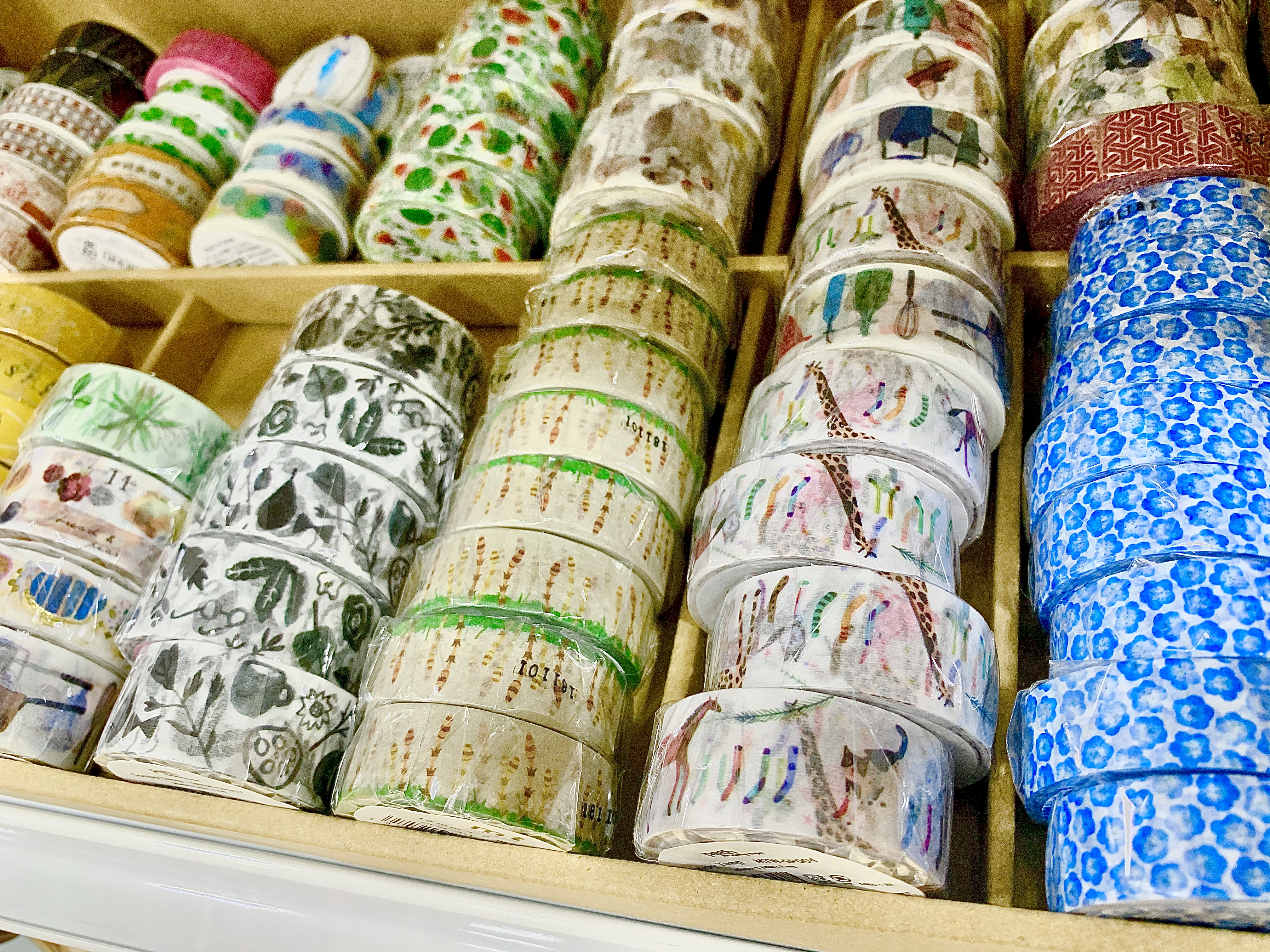 店舗に陳列された柄付きのマスキングテープ